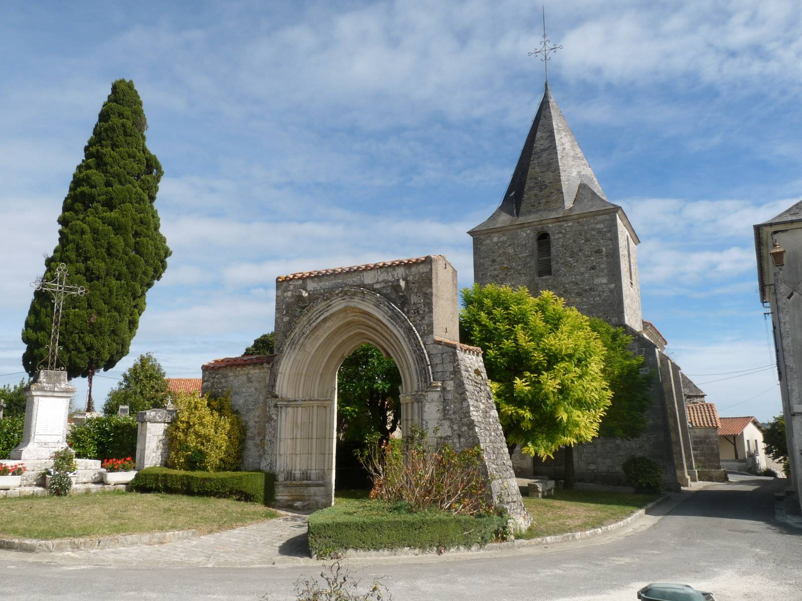 église de St-Laurent-de-Belzagot, Charente, France